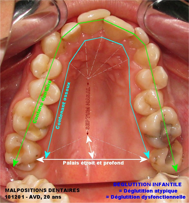 Déglutition salivaire dysfonctionnelle : encombrements dentaires.